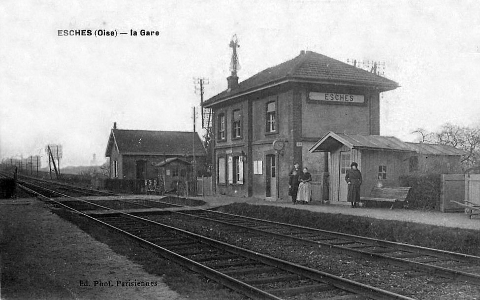 Intérieur de la gare d'Esches dans l'Oise, sur la ligne de Paris au Tréport, au début des années 1900.